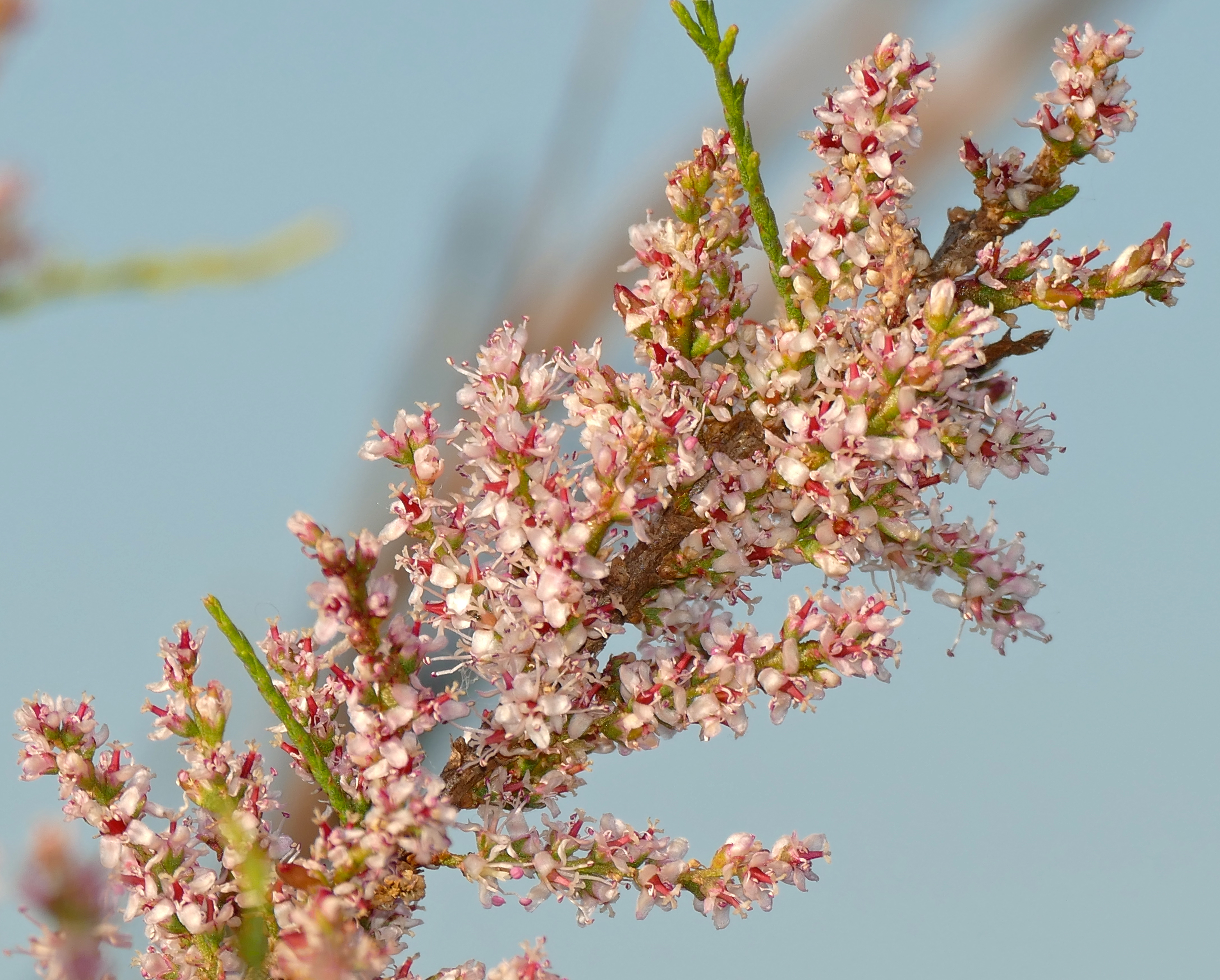 Estanys del Matar, Los Aiguamolls del' Empordà, Castelló d'Empúries, Catalunya, SPAIN